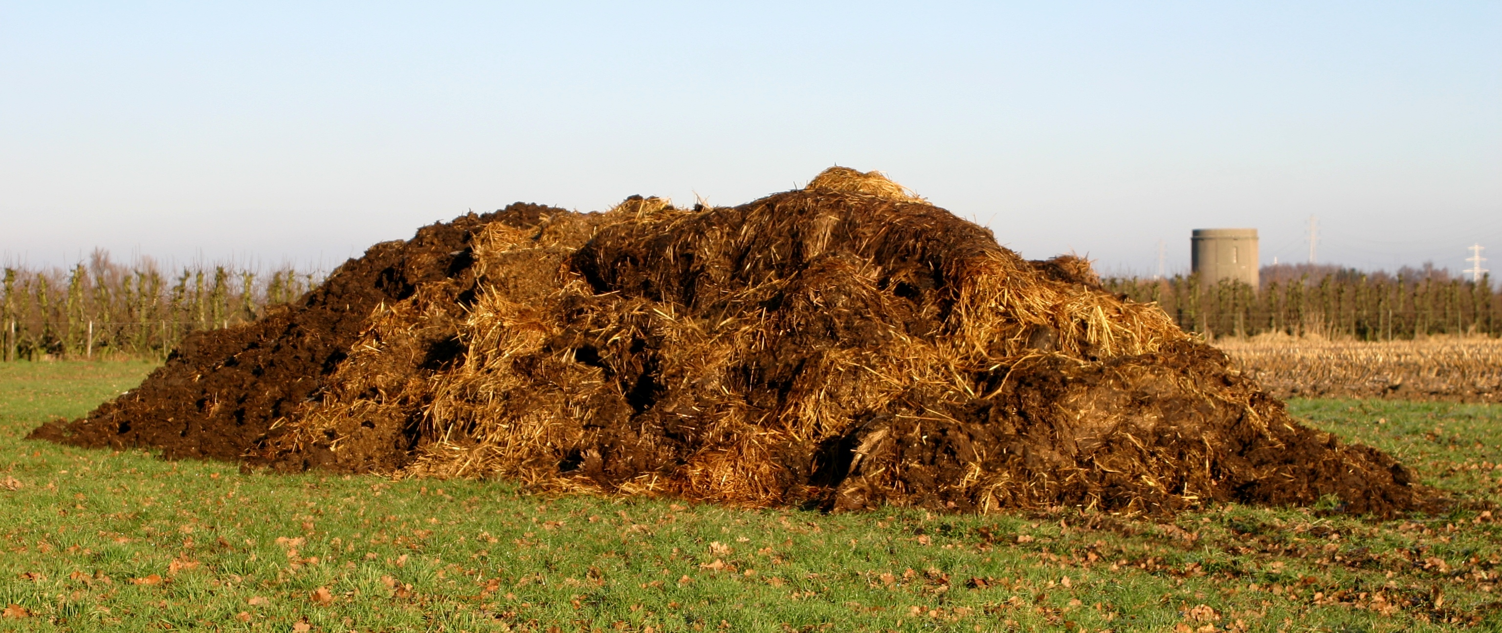 E Mëschtkoup.